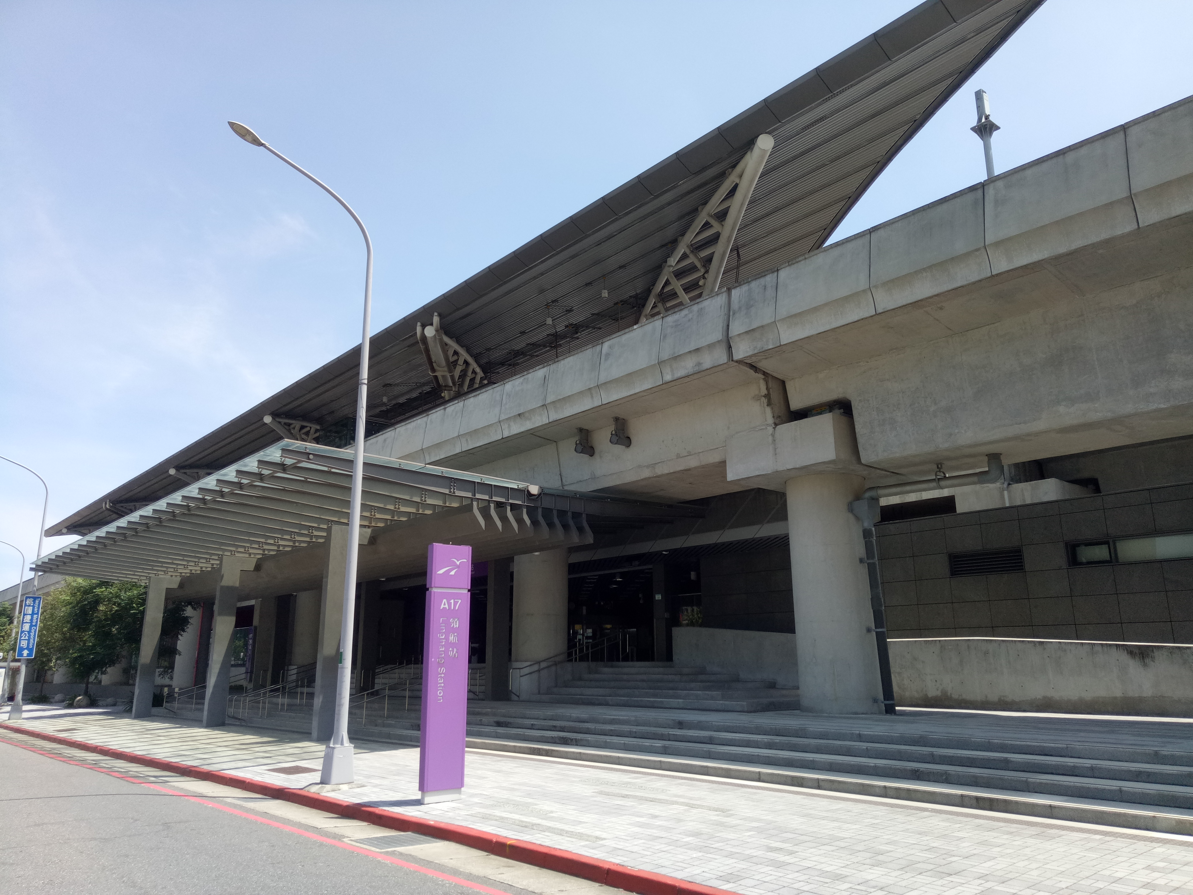 桃園捷運機場線領航站。（A17）